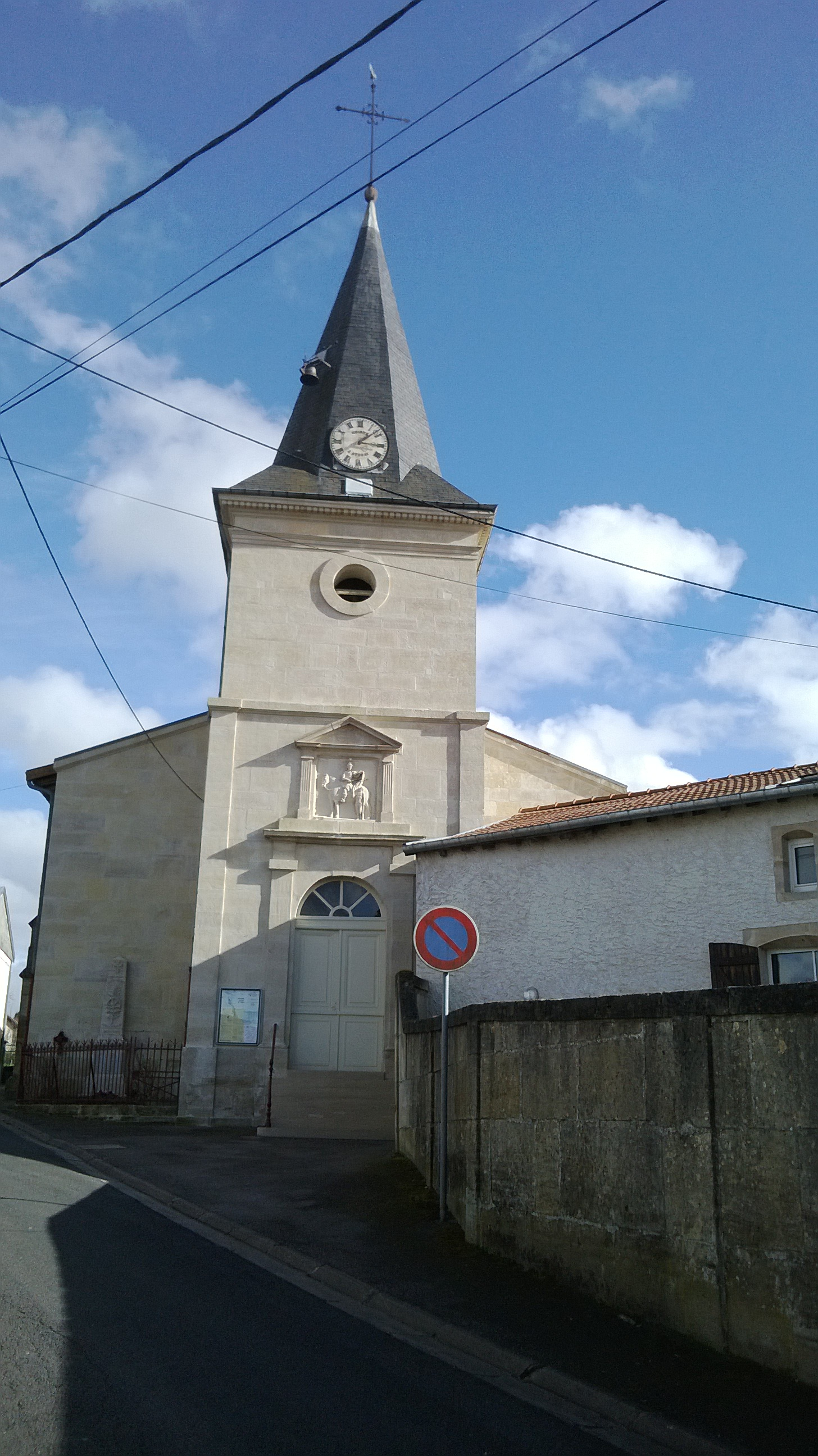 Eglise Saint-Martin de Behonne